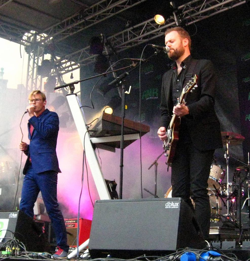 Nordstrøm (Lars Malm & Troels Holdt) i Hjørring, 2010